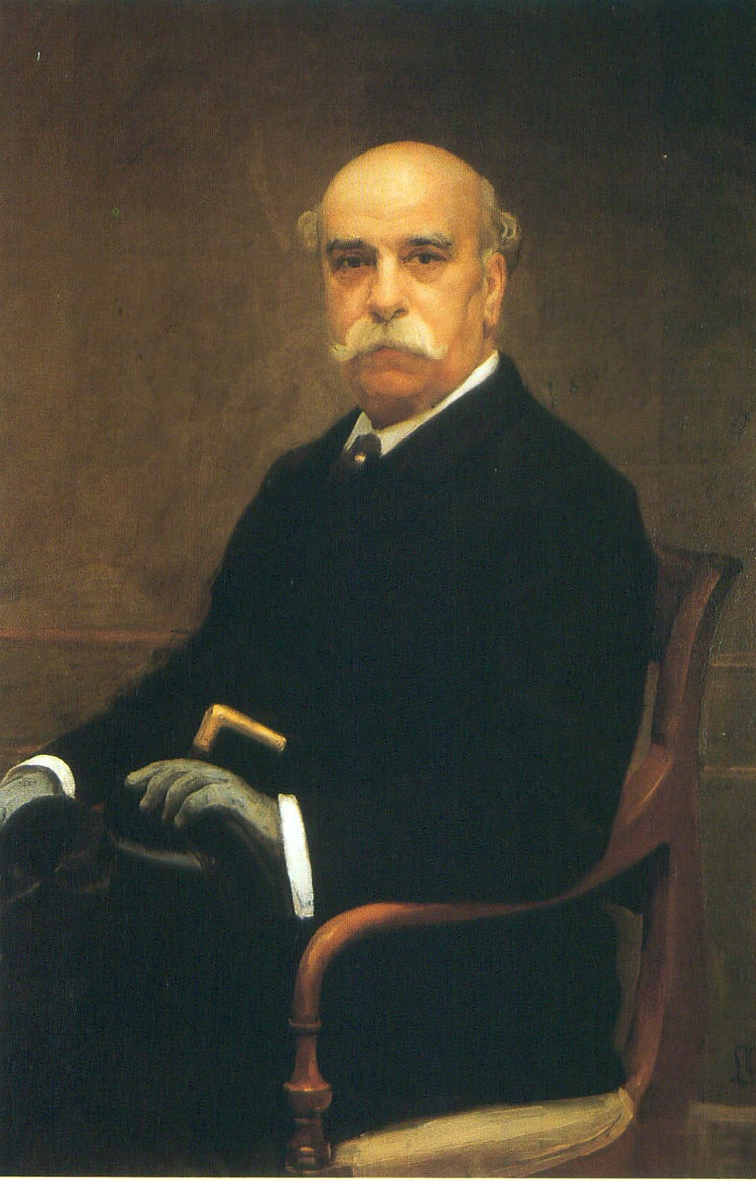 Retrato del aristócrata y político español Luis Pidal y Mon (1842-1913), segundo marqués de Pidal y vigésimo segundo presidente del Senado de España.